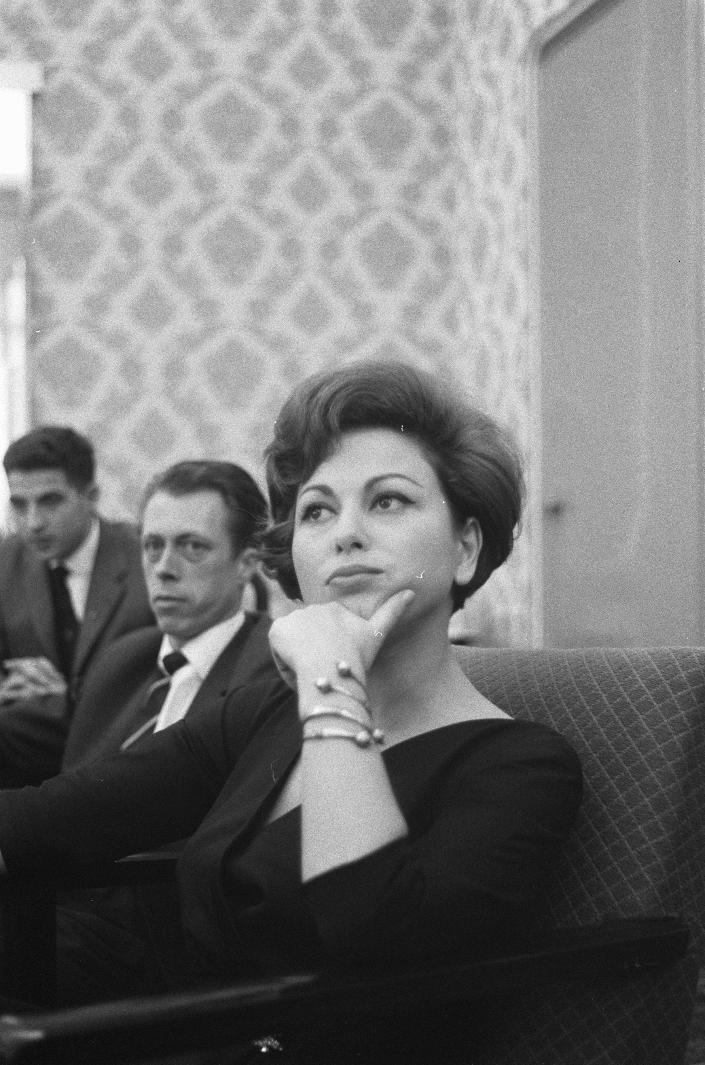 Collectie / Archief : Fotocollectie Anefo Reportage / Serie : [ onbekend ] Beschrijving : Persconferentie in het Carltonhotel door filmactrice Haya Harareet Annotatie : [Promotie film "Ben Hur"]. Harareet speelde de rol van Esther in deze film. Datum : 7 oktober 1960 Locatie : Amsterdam, Noord-Holland Trefwoorden : actrices, filmsterren, hotels, persconferenties Persoonsnaam : Harareet, Haya Fotograaf : Pot, Harry / Anefo Auteursrechthebbende : Nationaal Archief Materiaalsoort : Negatief (zwart/wit) Nummer archiefinventaris : bekijk toegang 2.24.01.05 Bestanddeelnummer : 911-6569